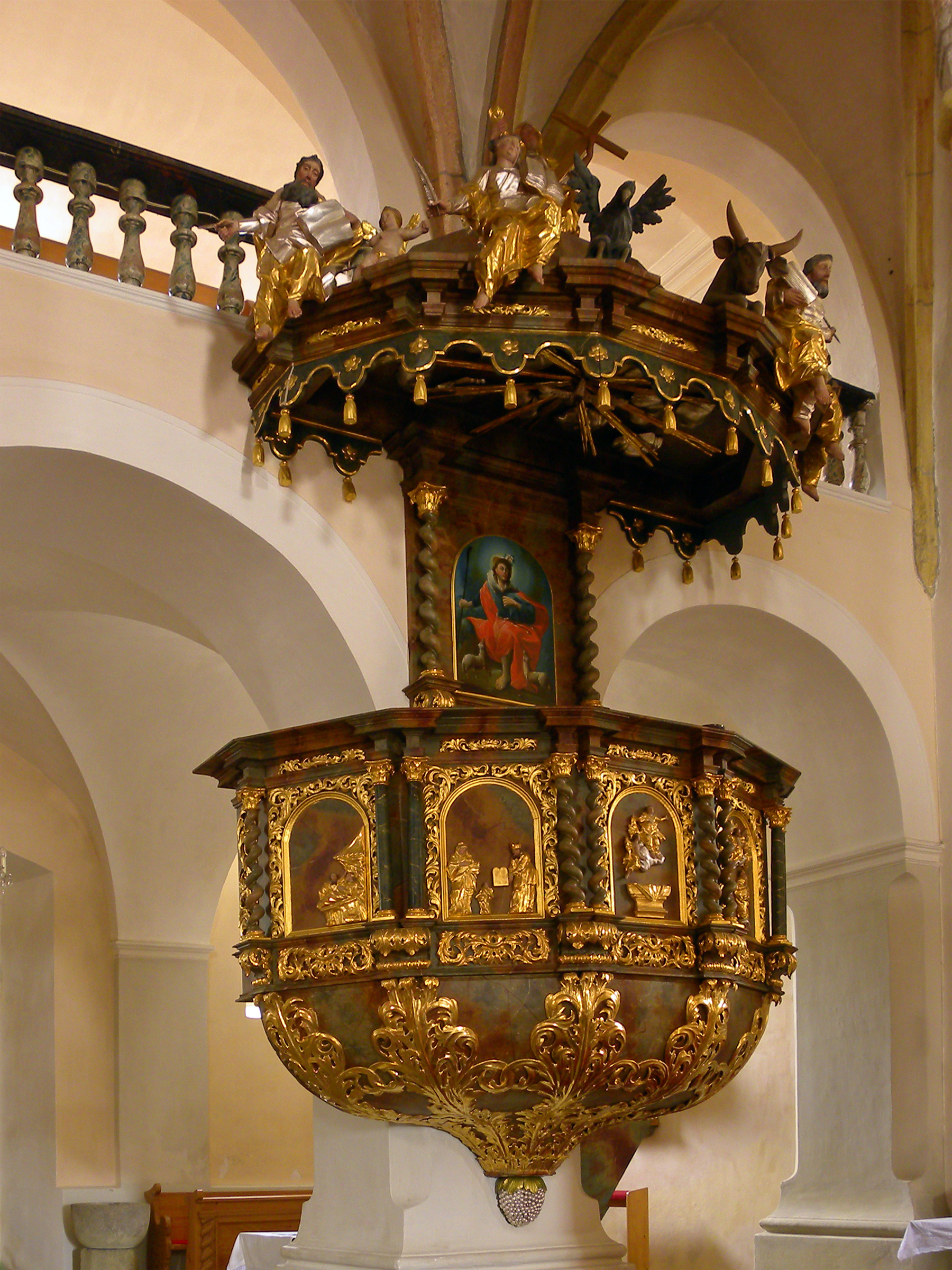 Kath. Pfarrkirche Mariä Geburt und Friedhof